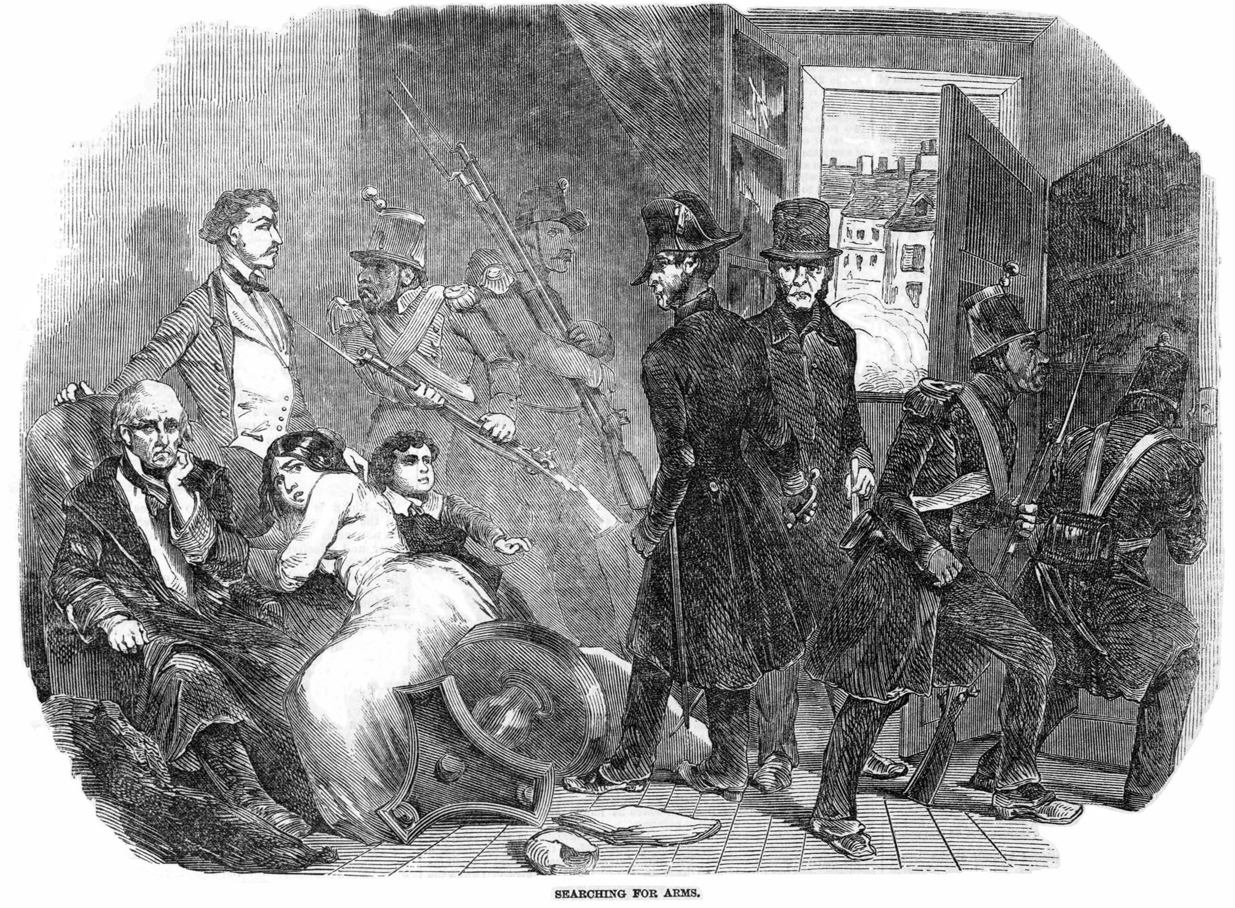 Searching for arms. La police et les soldats recherchent des armes chez des opposants durant le coup d'État du 2 décembre 1851. Illustration publiée dans The Illustrated London News, 10 janvier 1852.